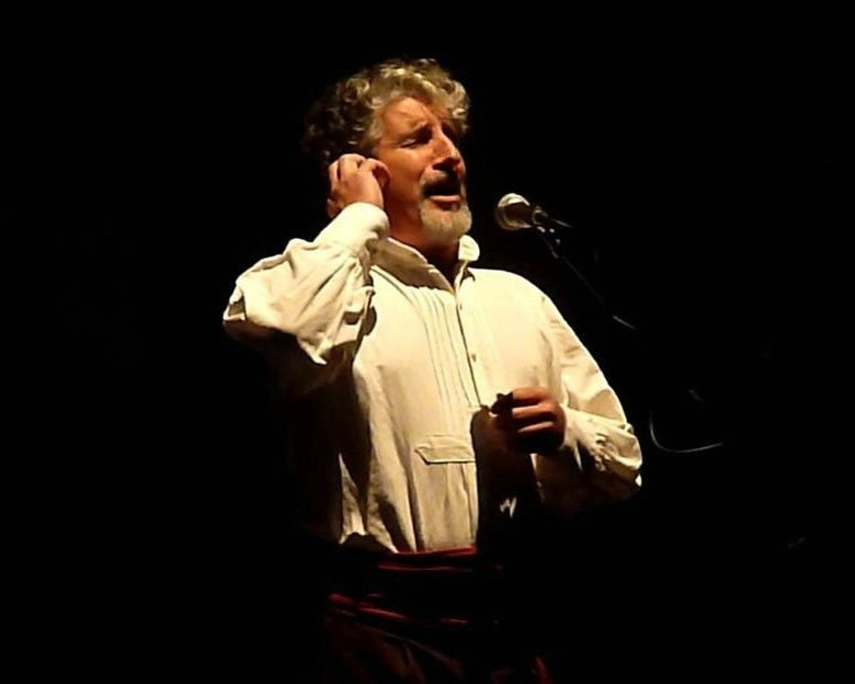 Concierto de Treixadura, el 11 de marzo de 2012 en Pontevedra Mi buen amigo Delio...suyas son las "muiñadas" en el Muiño vello de Redondela...todos los martes...